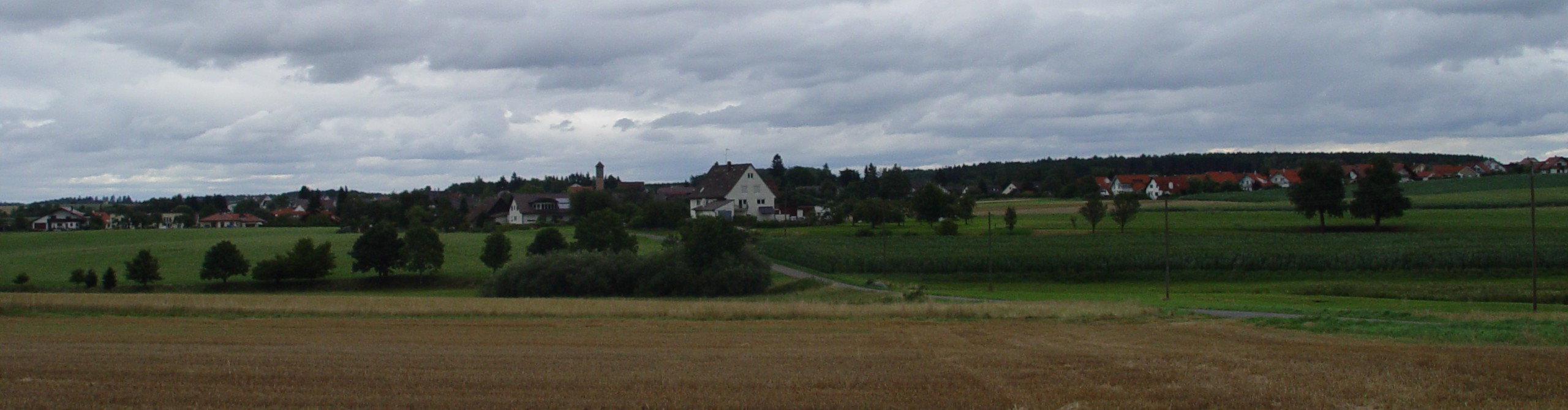 Walbertsweiler, Teilort der Gemeinde Wald, Landkreis Sigmaringen, Baden-Württemberg, Deutschland. Ansicht von Nordwesten